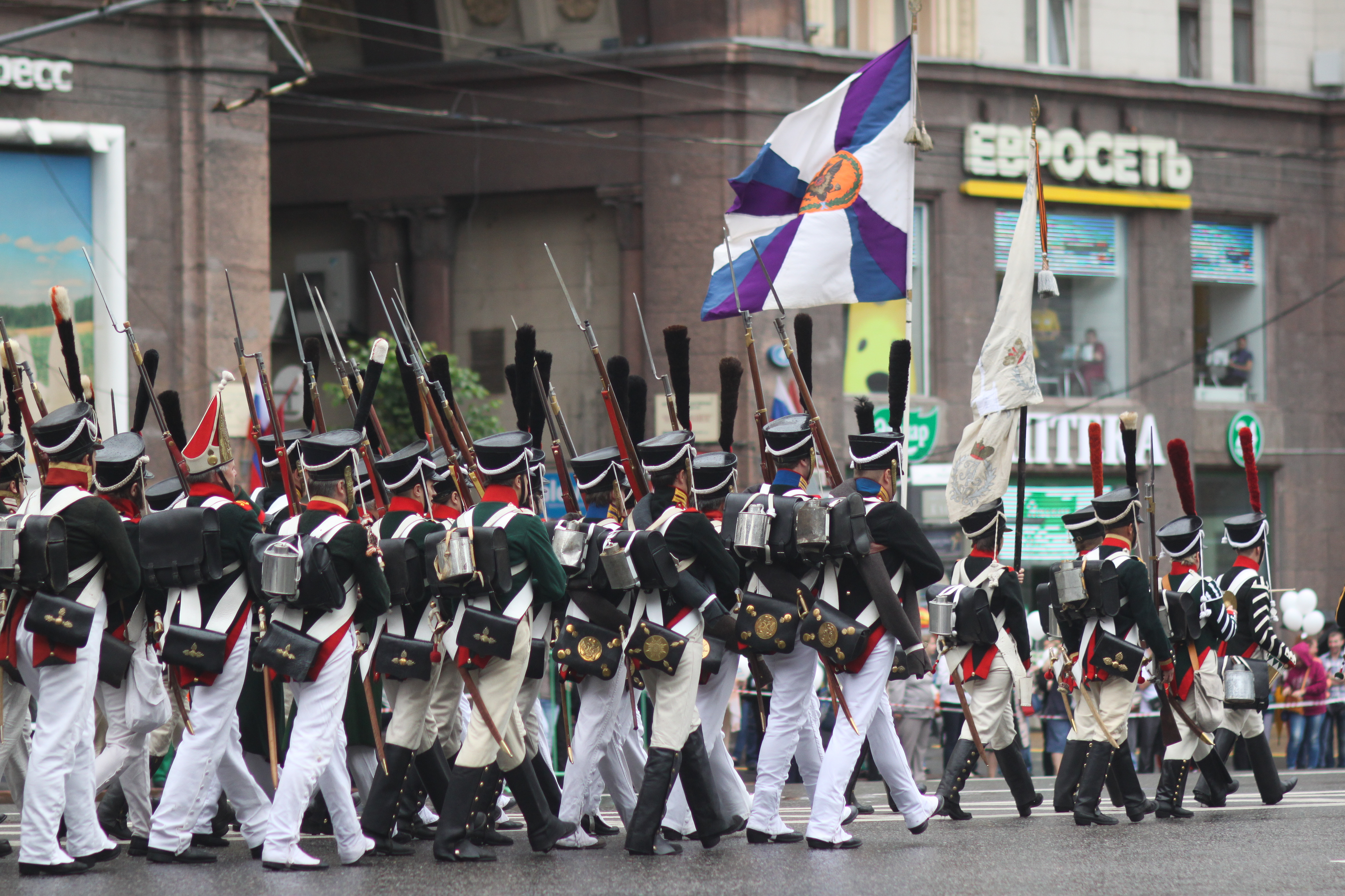 Парад в честь Дня России на Тверской улице